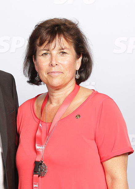 Fotobox am Bundesparteitag 2016